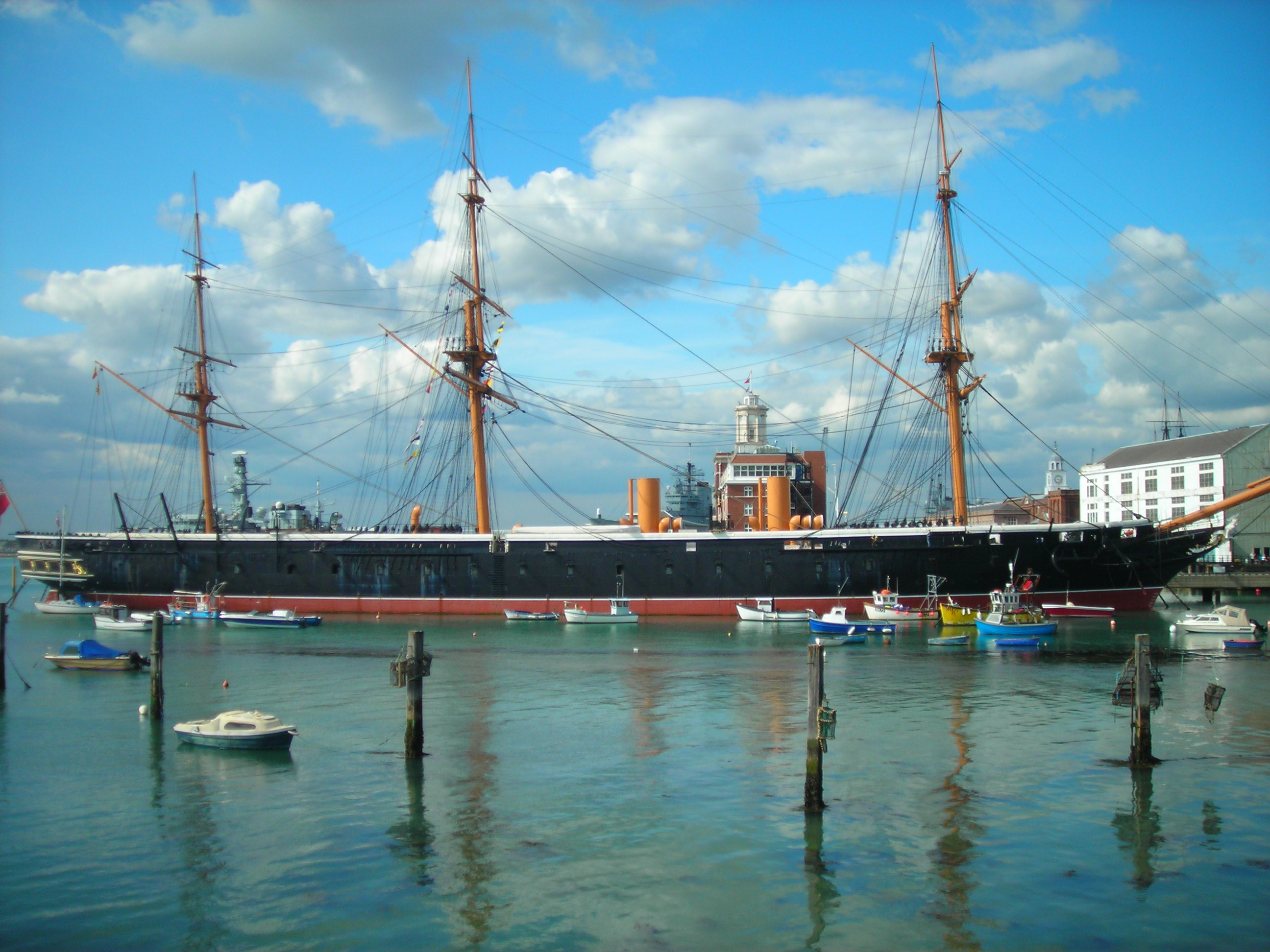 HMS Warrior in Portsmouth, UK